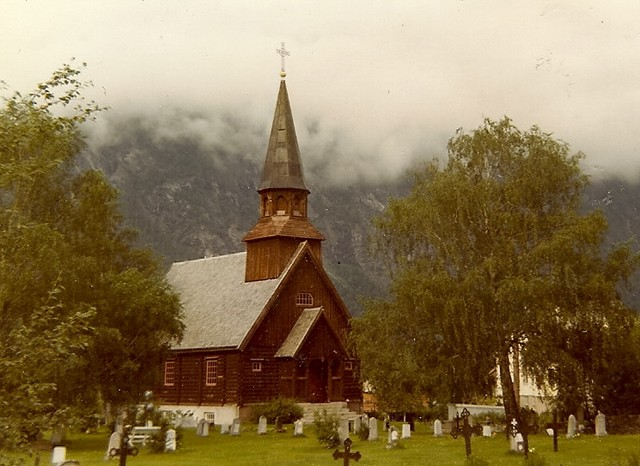 Gjøra kapell